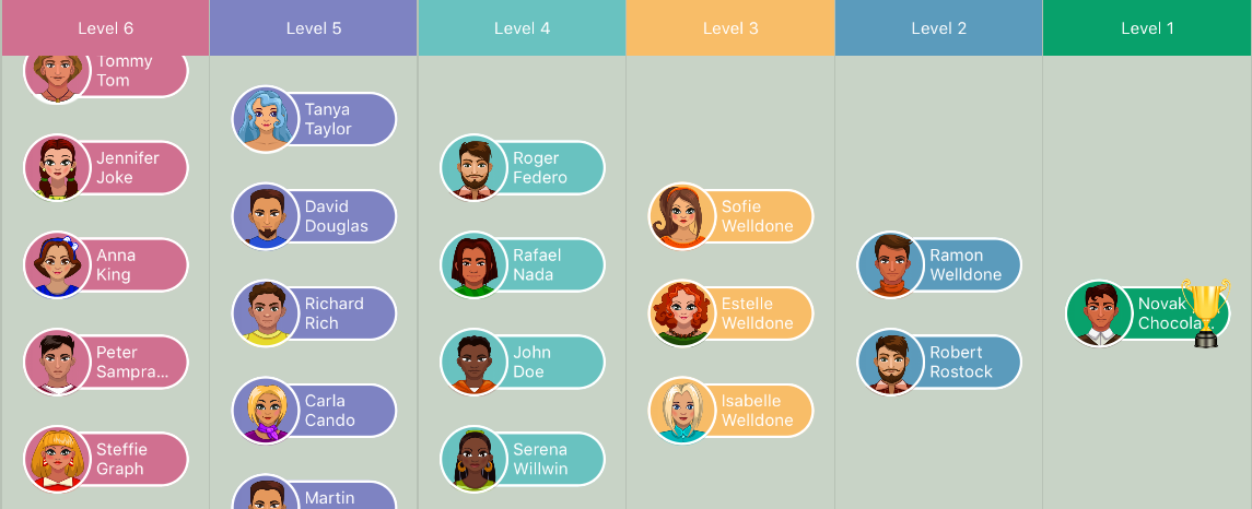 Voorbeeld van een laddercompetitie in pyramide vorm en horizontaal getoond(landscape)